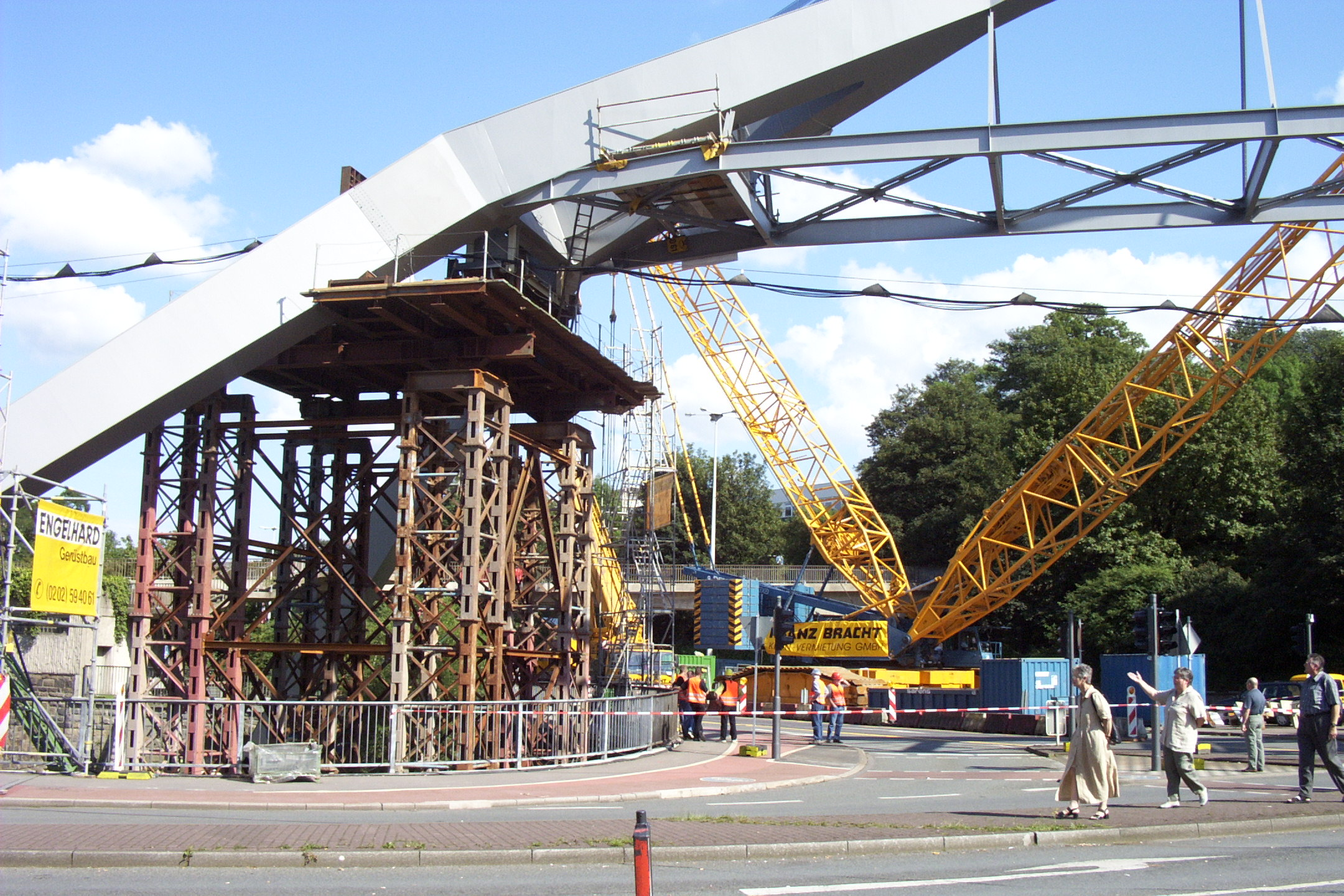 Bundesallee, Wuppertal